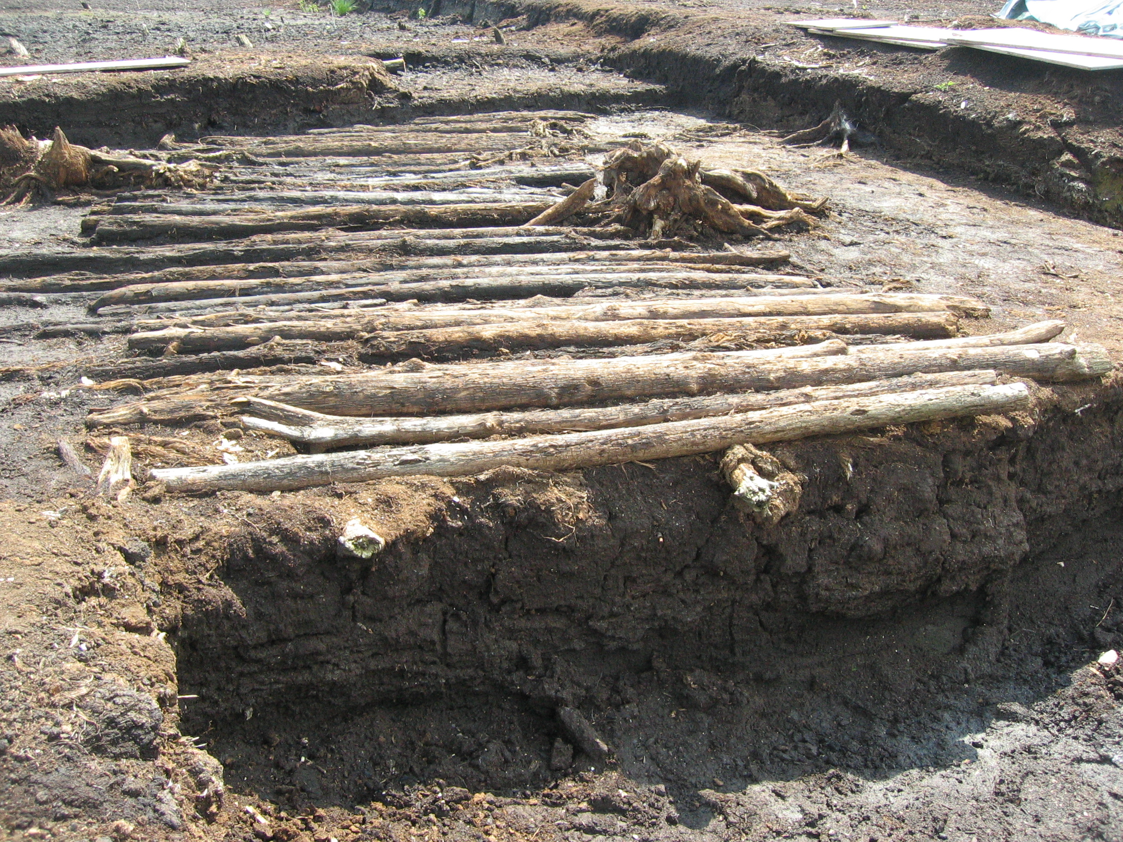 Hier die mittlere Grabungsebene